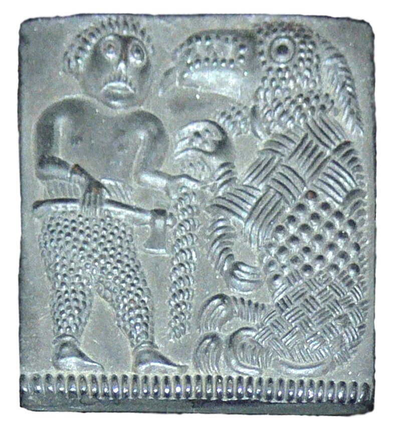 Vier Model aus Björnhovda im Kirchspiel Torslunda auf Öland (Schweden). 2. Hälfte des 6. Jh. Replik im Römisch-Germanischen Museum in Mainz. (Original im Staatlichen Historischen Museum Stockholm).